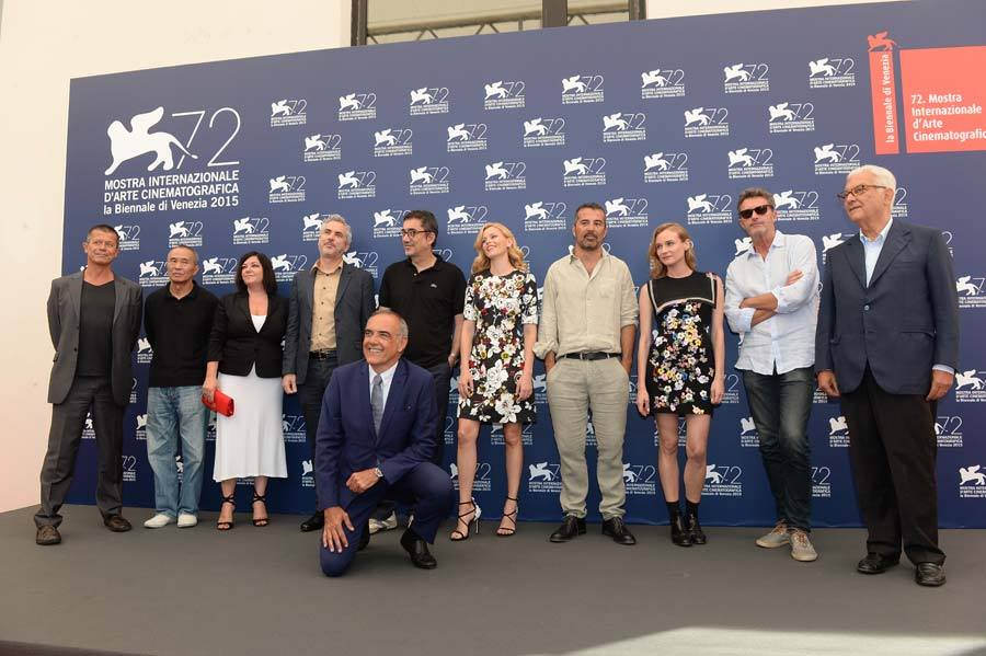 Jury di Venezia 72